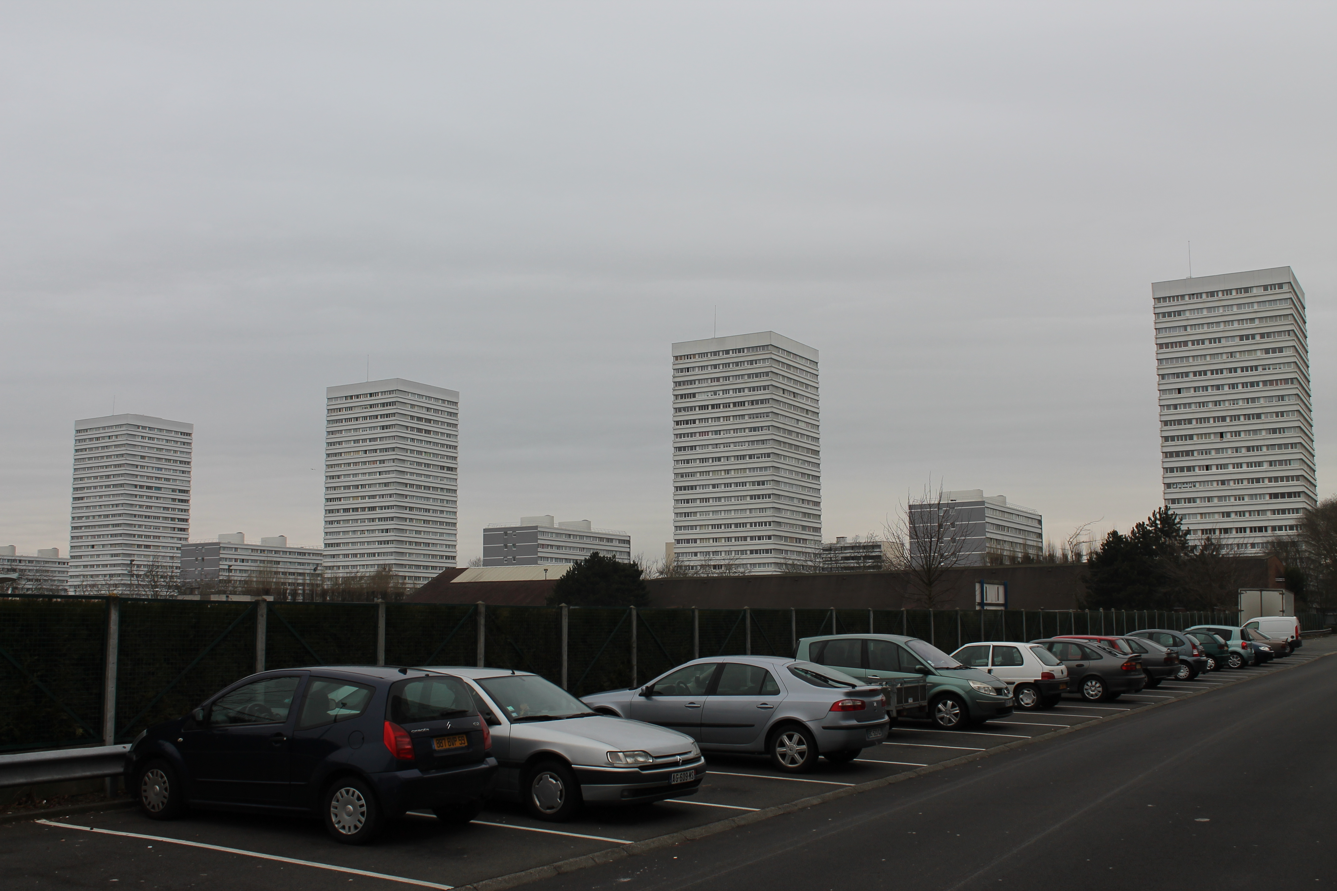 Résidence construite dans les années 60 à Mons-en-Baroeul suite au classement d'une grande partie du territoire communal en ZUP. Elle est devenue le symbole de la ville.